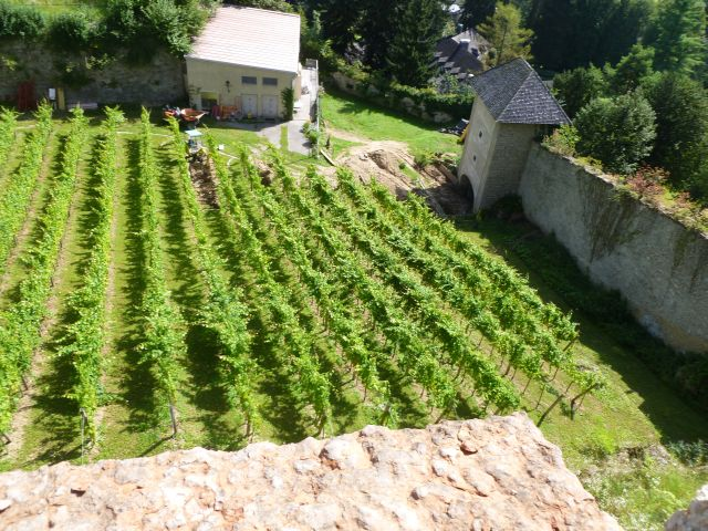 Paris-Lodron-Zwinger_Bertoldssturm